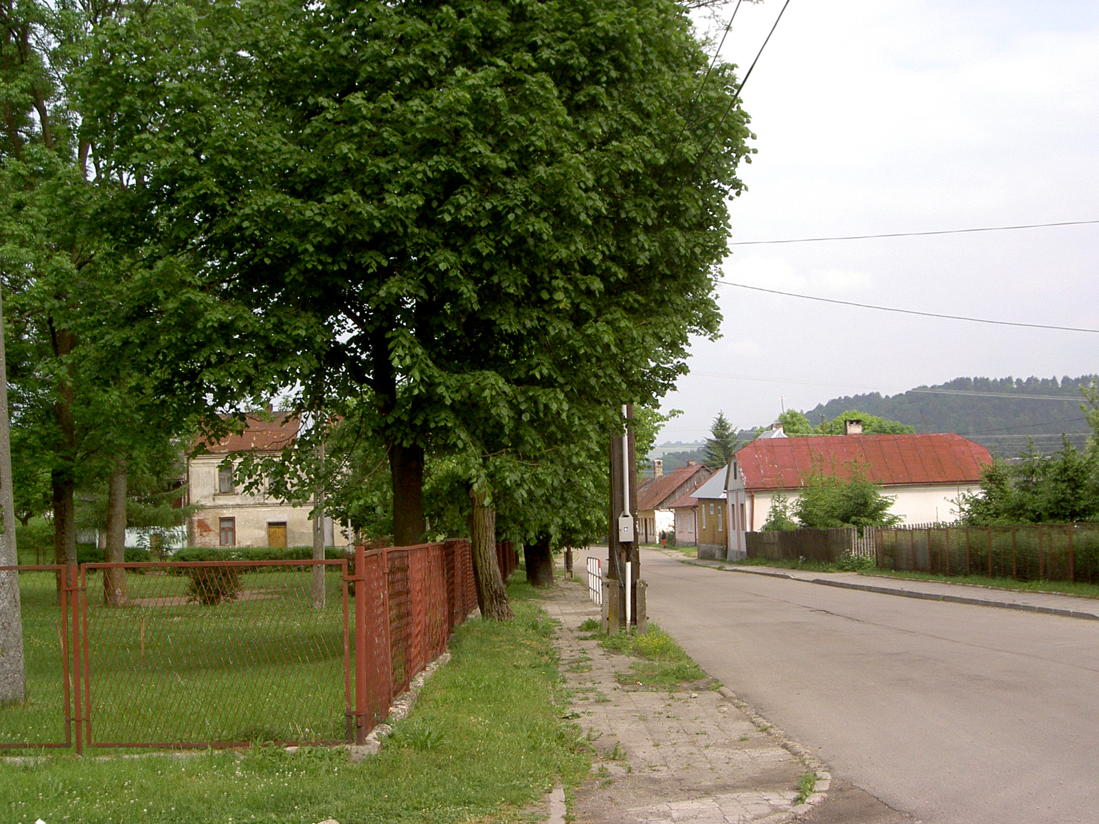 Rybotycze, Rynek• Rybotycze, Poland - Town square